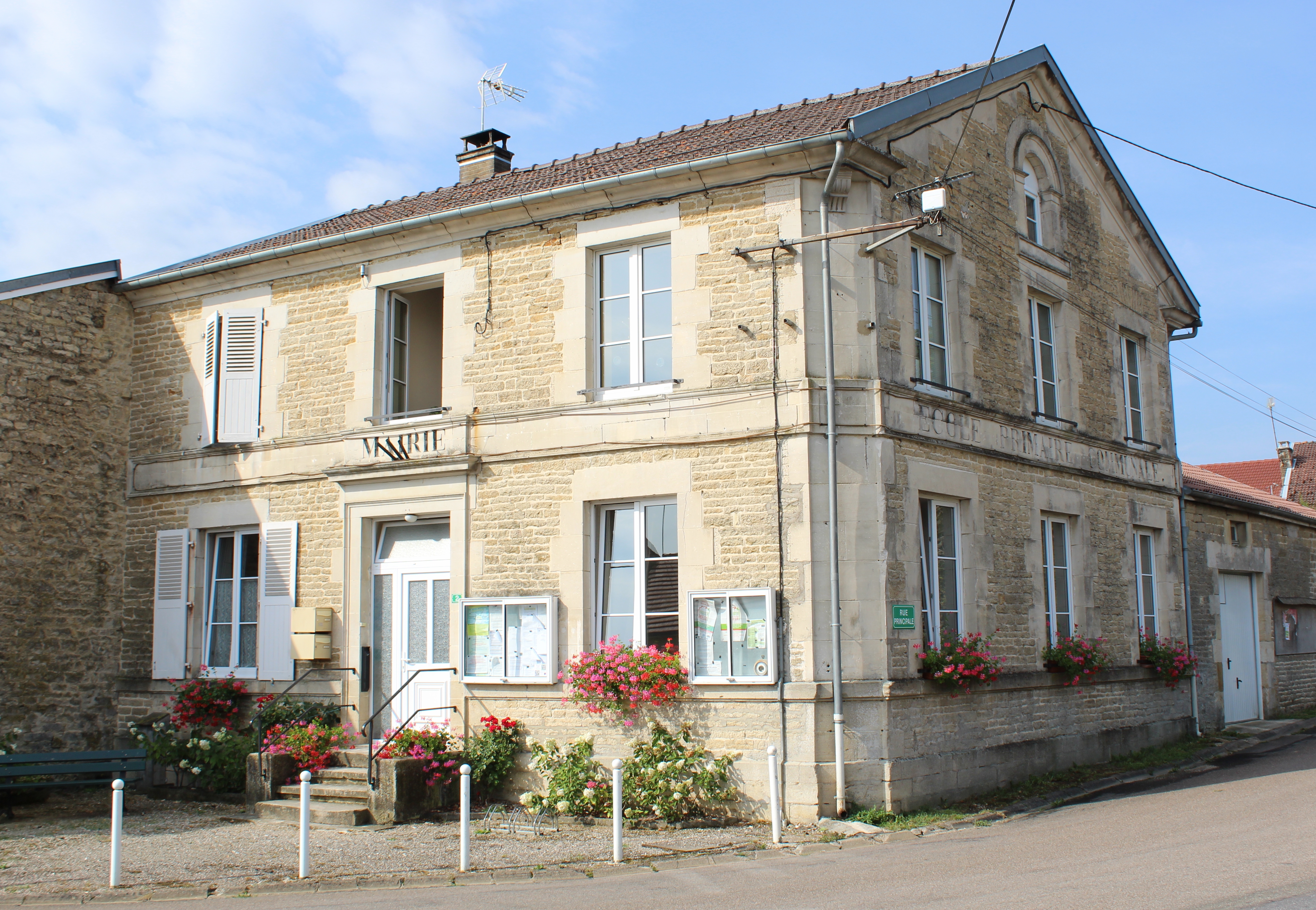 La mairie